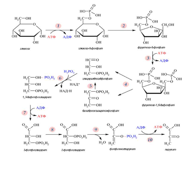 Гликолиза - реакции